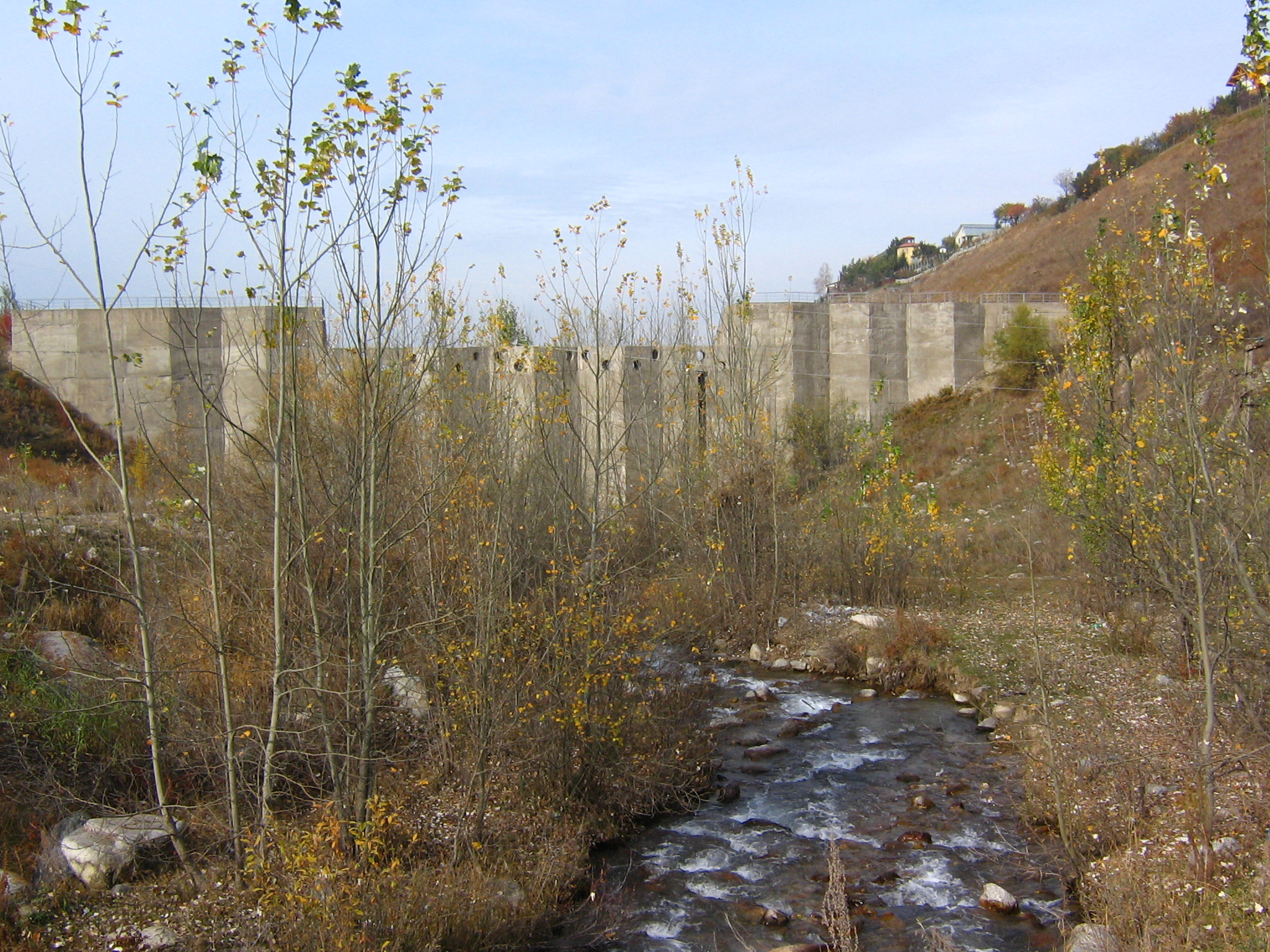 Платина на реке Карагалинка